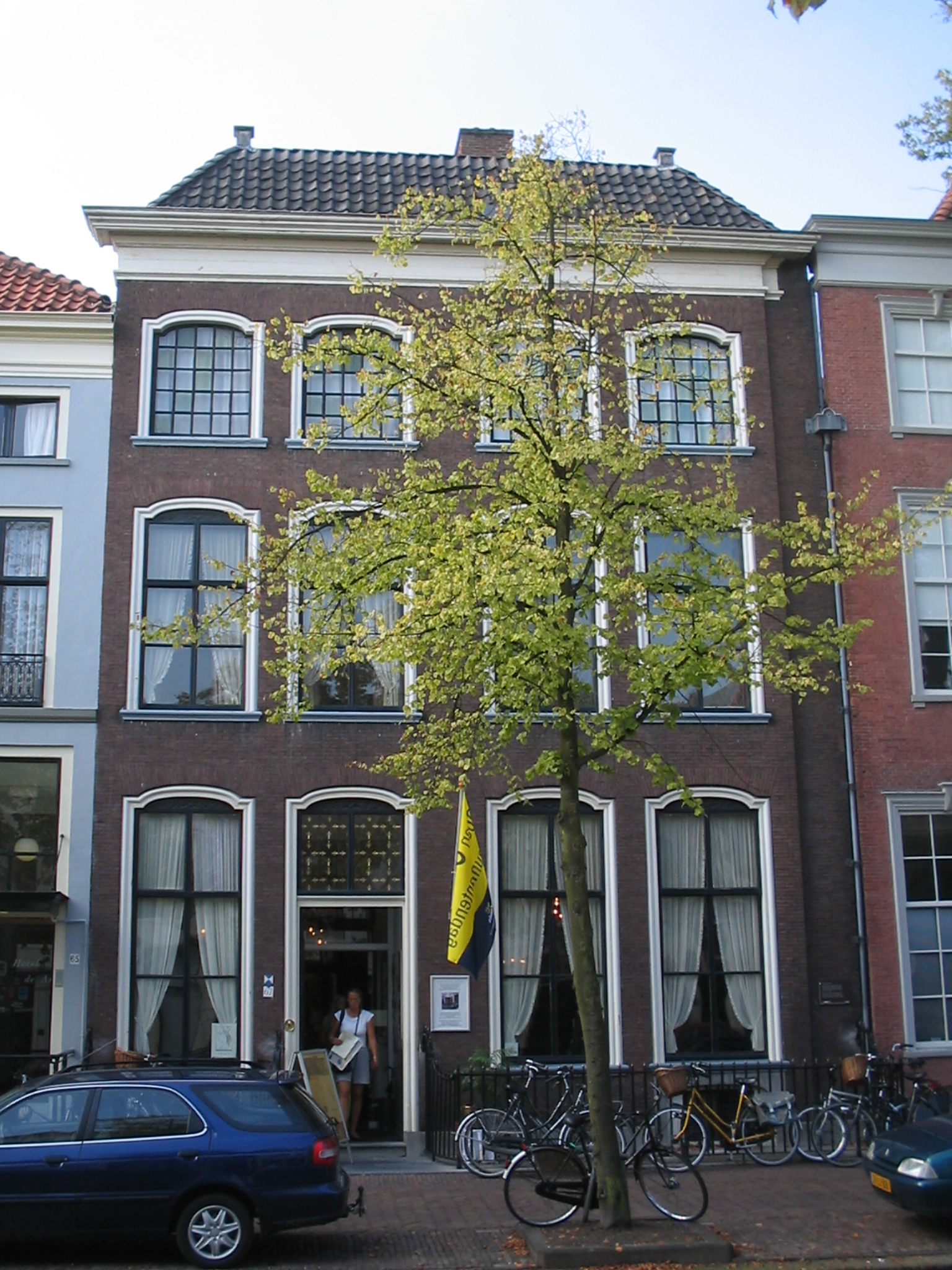 Museum Elven, Delft. Sept. 2005